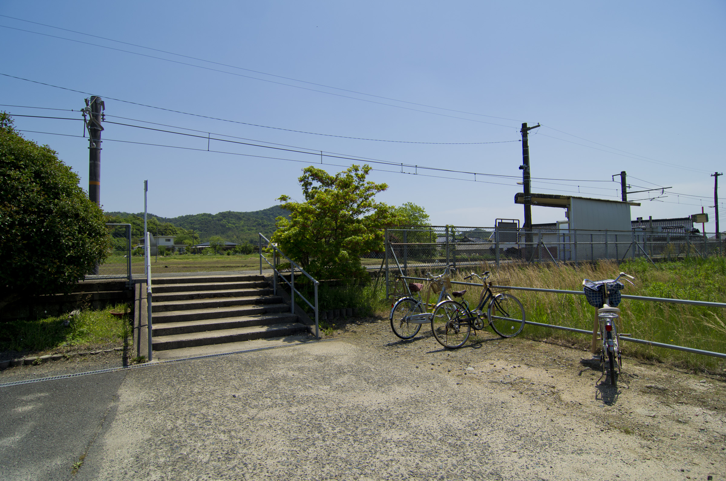 西日本旅客鉄道株式会社宇部線上嘉川駅